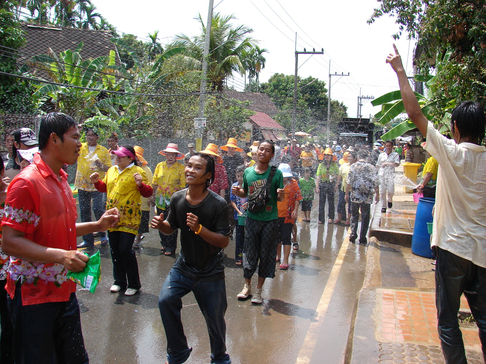 Songkran in Laplae, Uttaradit, Thailand